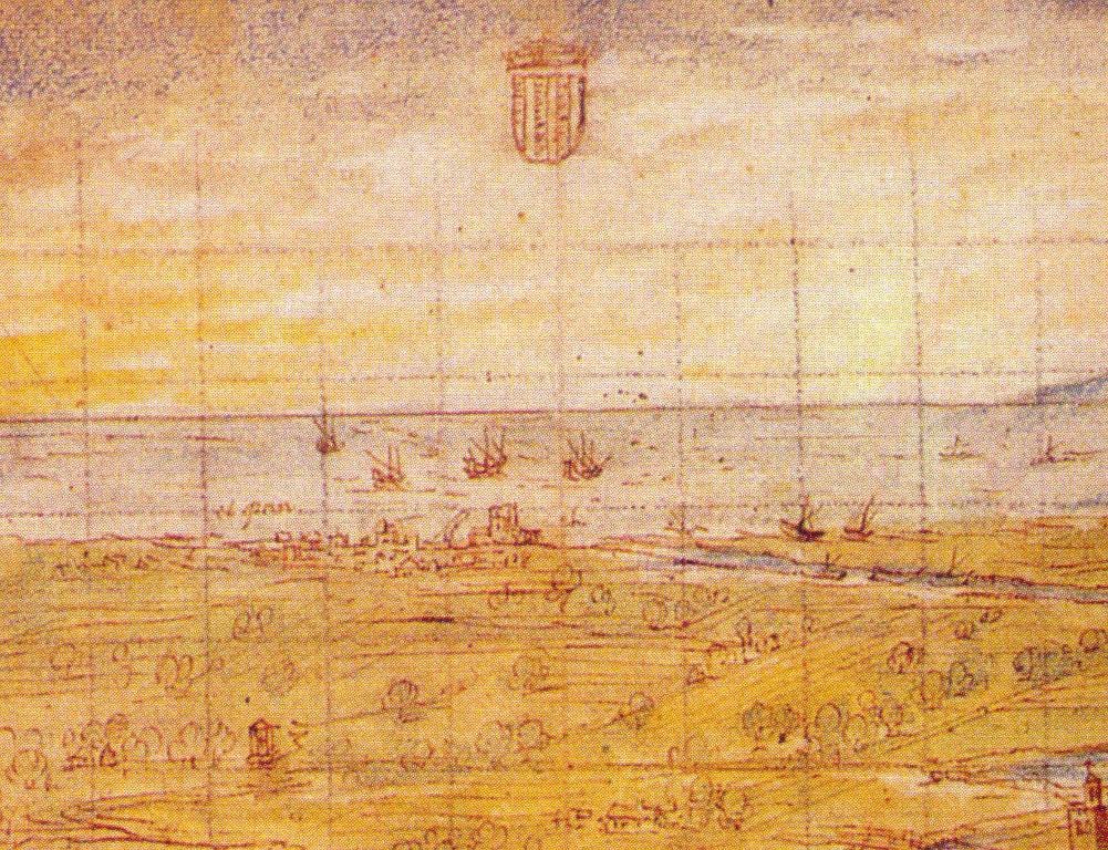 Grau de València en 1563, detall de la vista de Wijngaerde.